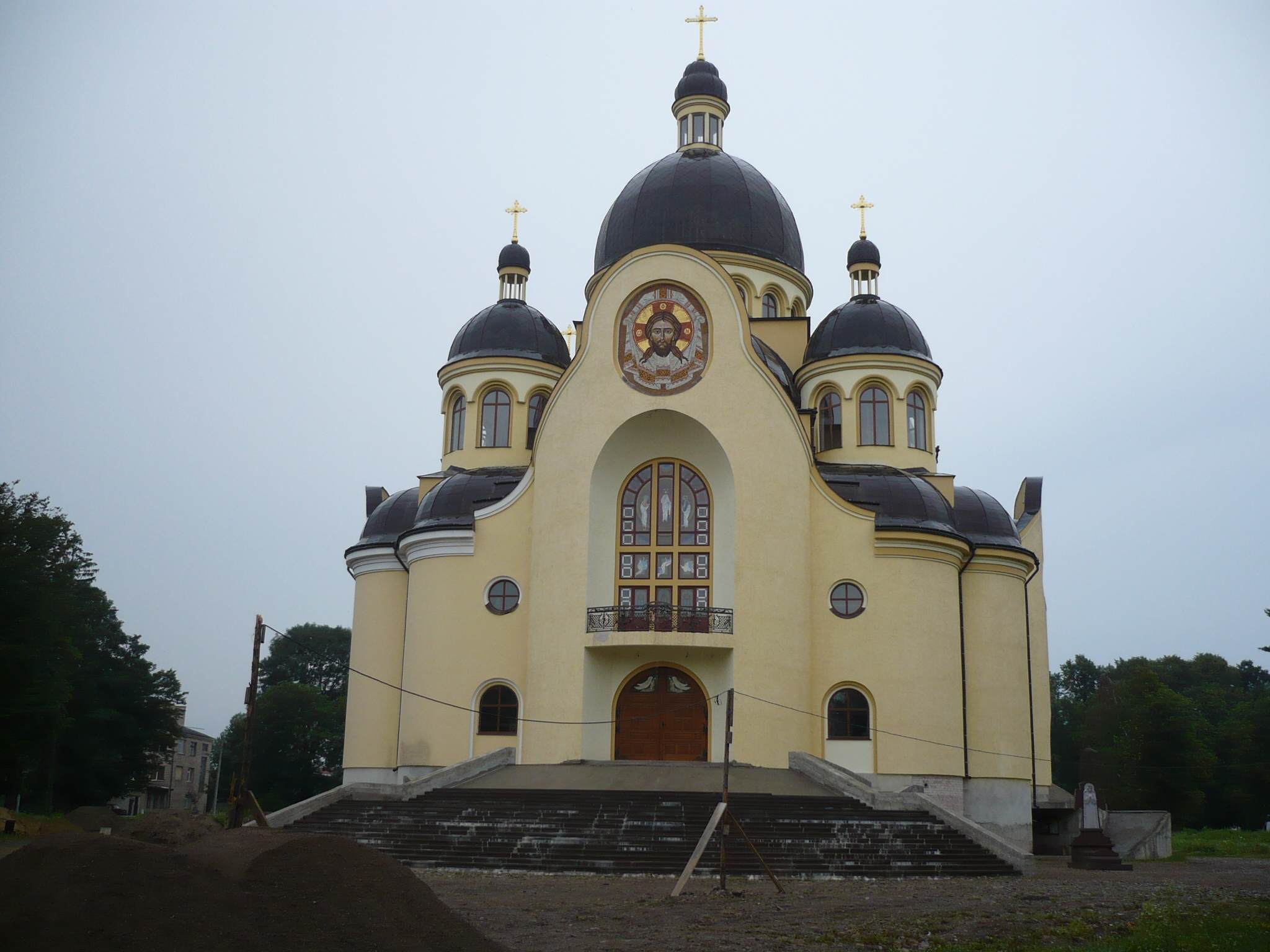 Kołomyja, cerkiew, 2009 r.